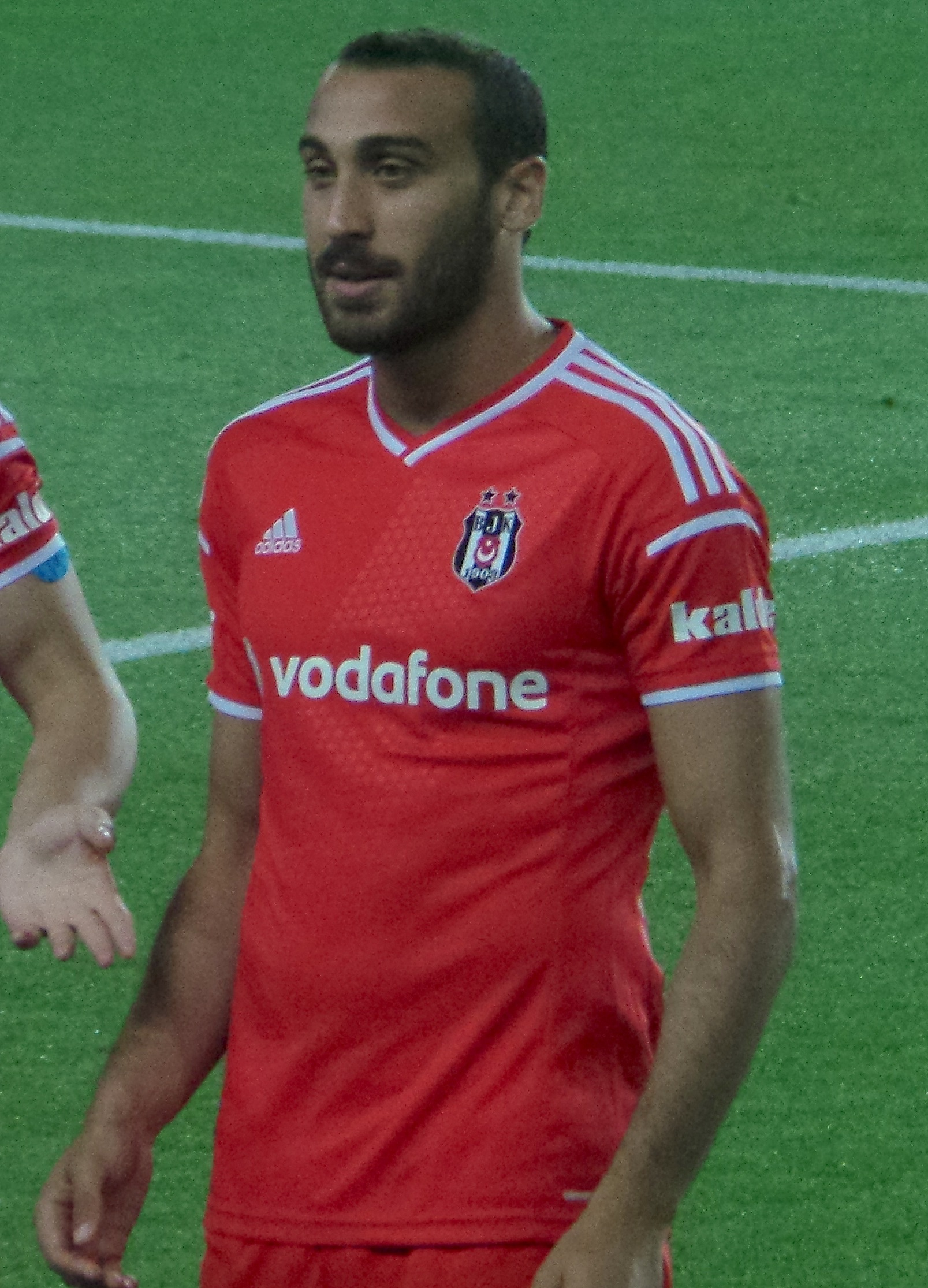 Cenk Tosun (1) - SOMA Turnuvası